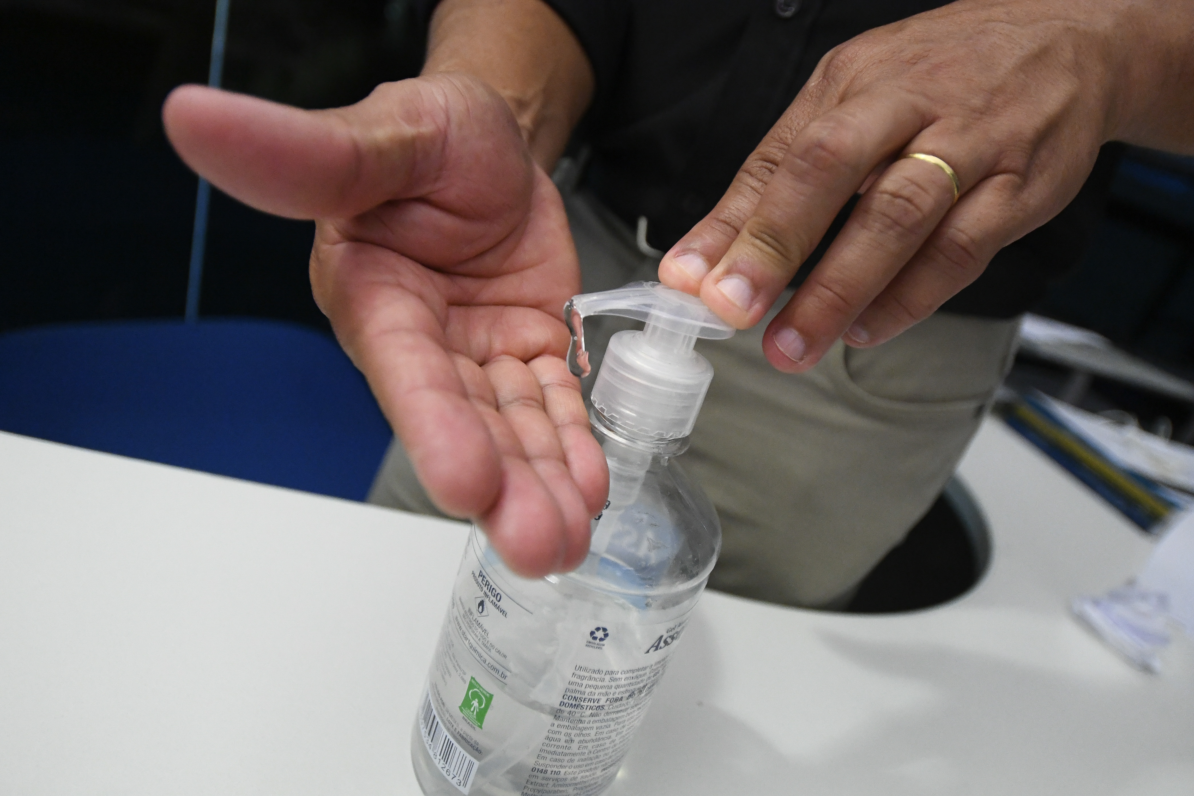 Hábitos de higiene são os maiores aliados na guerra contra o Coronavírus. Para evitar a proliferação do vírus, o Ministério da Saúde recomenda medidas básicas de higiene, como lavar bem as mãos (dedos, unhas, punho, palma e dorso) com água e sabão, e, de preferência, utilizar toalhas de papel para secá-las. Além do sabão, outro produto indicado para higienizar as mãos é o álcool gel, que também serve para limpar objetos como telefones, teclados, cadeiras, maçanetas, etc. Para a limpeza doméstica recomenda-se a utilização dos produtos usuais, dando preferência para o uso da água sanitária (em uma solução de uma parte de água sanitária para 9 partes de água) para desinfetar superfícies. Utilizar lenço descartável para higiene nasal é outra medida de prevenção importante. Deve-se cobrir o nariz e a boca com um lenço de papel quando espirrar ou tossir e jogá-lo no lixo. Também é necessário evitar tocar olhos, nariz e boca sem que as mãos estejam limpas. Imagem: higienização das mãos com álcool gel. Foto: Marcos Oliveira/Agência Senado